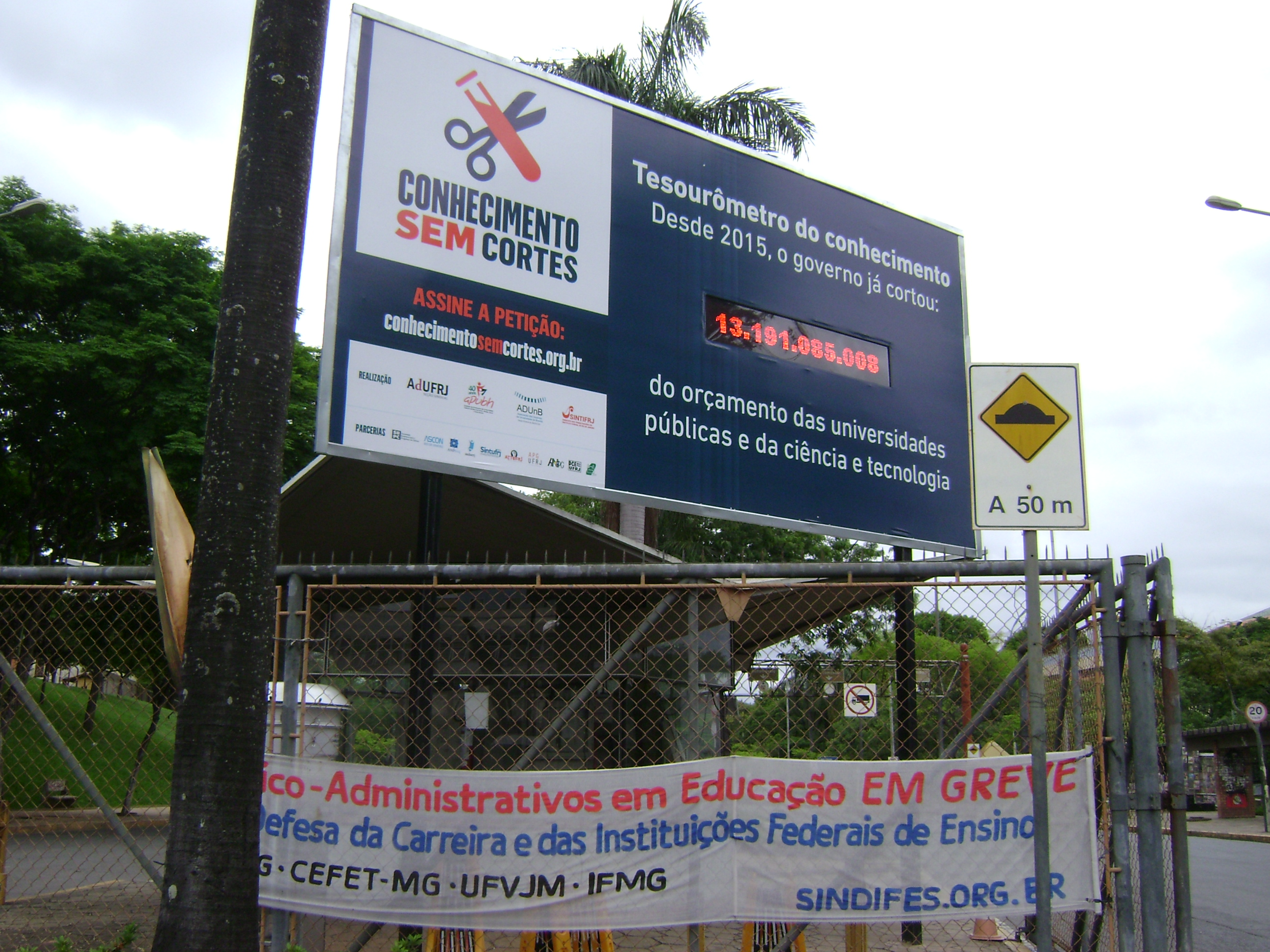 Imagem de "tesourômetro" instalado na entrada da UFMG, campus Pampulha, em Belo Horizonte.